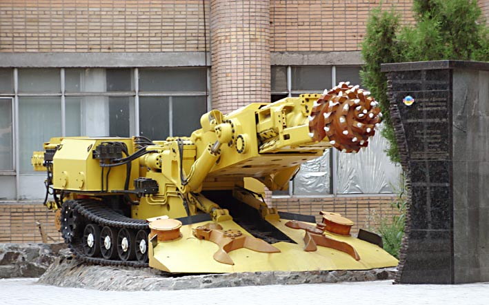 Bergbaumaschine (Teilschnittmaschine) aus dem Kohlerevier Donezk, Ukraine. Made from public place (street - see also Panoramafreiheit)